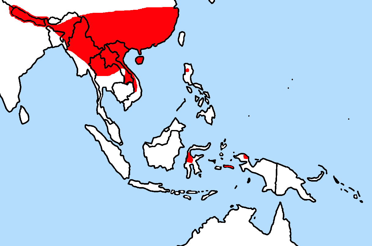 Himalayan rat (Rattus nitidus), distribution map